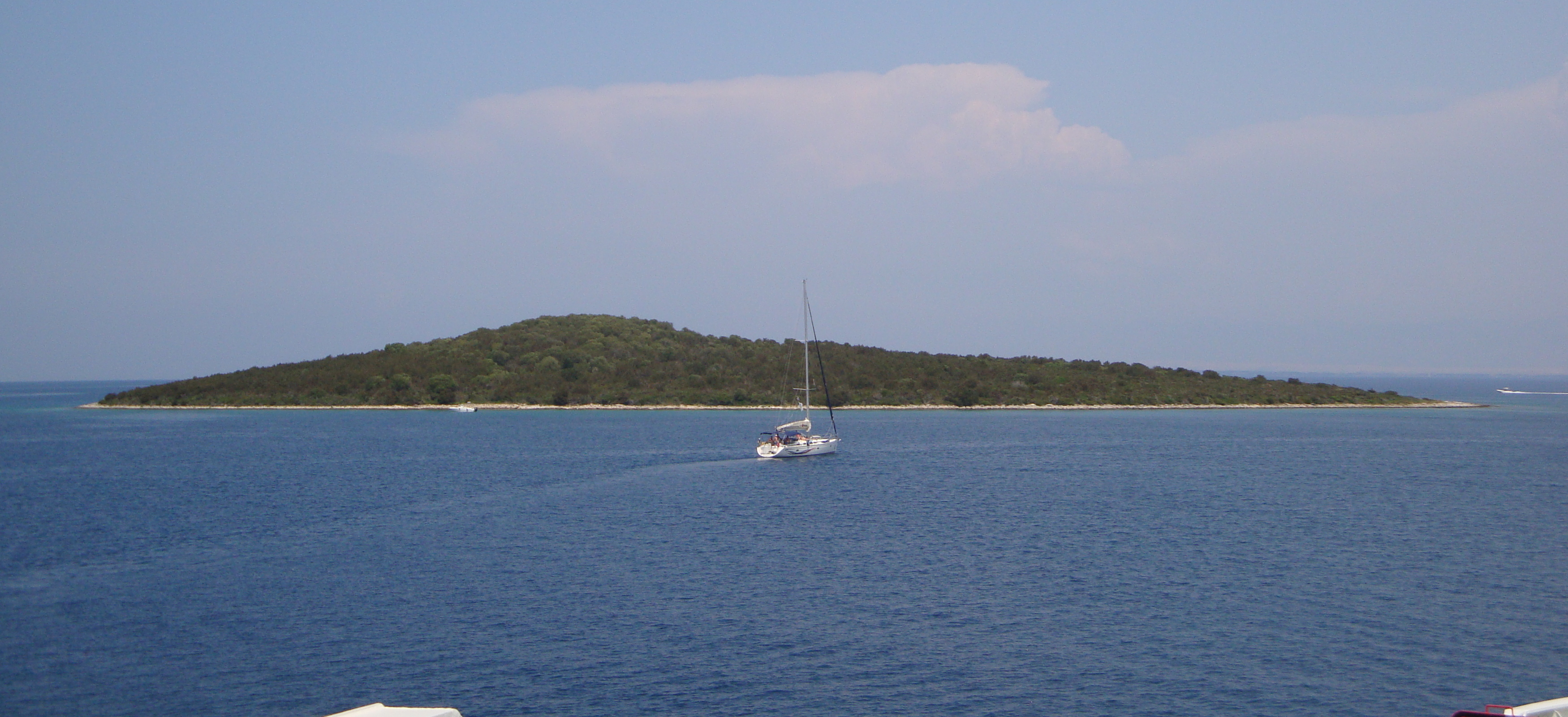 Otok Idula